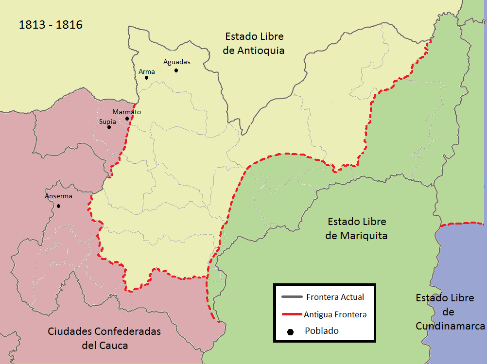 mapa de caldas